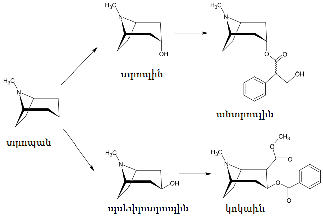 Կոկաինի ստացում